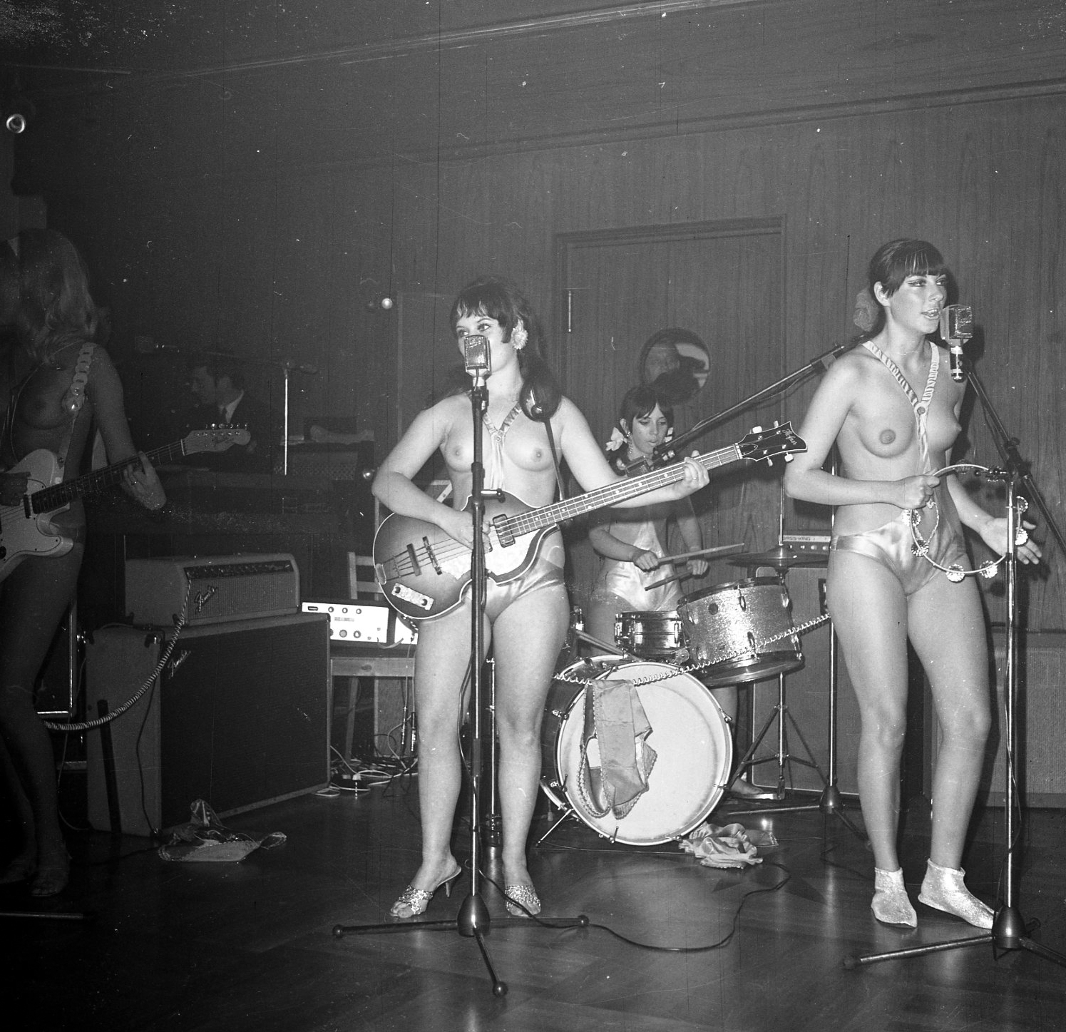 Jentenes navn: Nichole(?), Sussi, Jeanette, Bonni. I September opptrådte jentebandet sammen med The New Yardbirds ved Fjordvilla Rock Paramount i Roskilde. The New Yardbirds skiftet senere samme år navn til Led Zeppelin. Kilde: Led Zeppelin Database Foto: Eirik Sundvor (1902 - 1992). Format: Negativ. År: 1968, 30 Juli. Sted: Bergen.